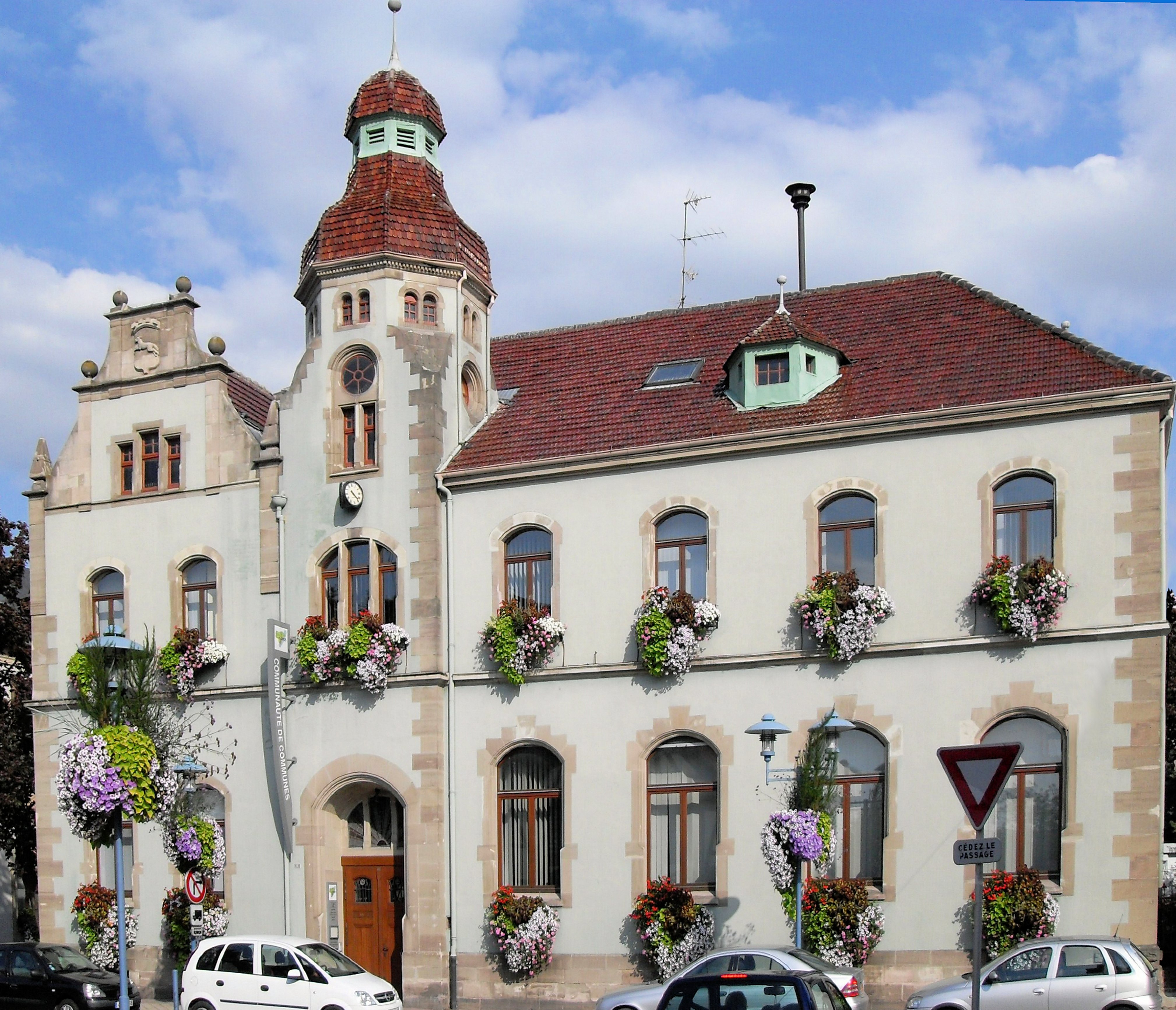 L'ancien quartier administratif de la CCME à Marckolsheim